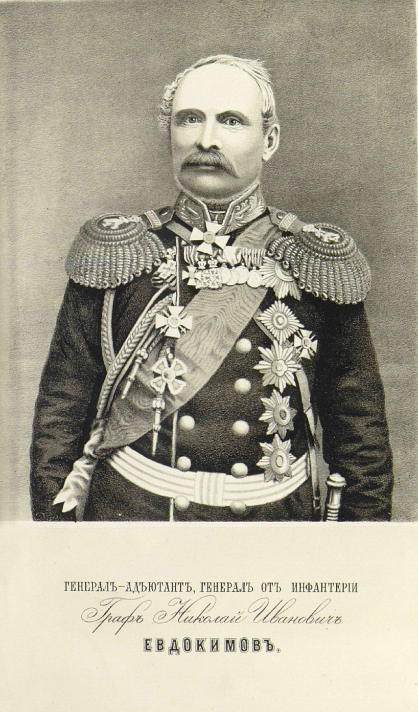 Генерал-адъютант, генерал от инфантерии, граф Николай Иванович Евдокимов